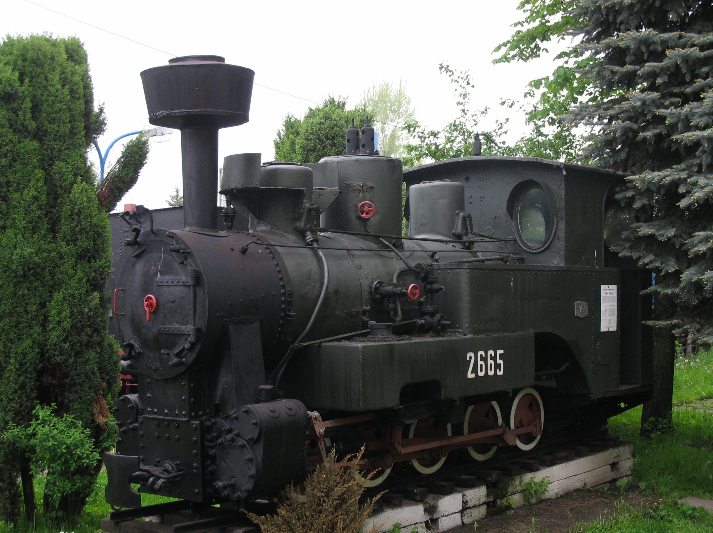 Lokomotywa parowa Tw1. Jest to jedyny na świecie zachowany parowóz tej serii. Eksponat skansenu taboru kolejowego w Chabówce. Lokomotywa wyprodukowana w 1918 roku w zakładach Schwartzkopff. Numer seryjny 6818. Od 1918 roku do końca II wojny światowej nosiła oznaczenia: HF 2665 (na kolejach wojskowych w czasie I wojny światowej), Es 451 (na PKP przed wojną), DR 991 611 (w czasie II wojny światowej). Od 1945 do 1956 pracowała na PKP w Mławie. W latach 1956-1969 była w rezerwie w kamieniołomie w Walkowicach. Z kamieniołomu przeniesiona do Cukrowni Leśmierz koło Łęczycy. Od 1969 do 1987 roku stała w szopie cukrowni "Młynów" w Młynowie. W 1987 roku przekazana do Muzeum Kolejnictwa. W 1989 roku odbudowana i ustawiona jako pomnik przed lokomotywownią w Suchej Beskidzkiej. 22.08.2000 roku przeniesiona do Skansenu w Chabówkce. Od 28.08.2000 roku stoi przed budynkiem administracyjnym Skansenu.